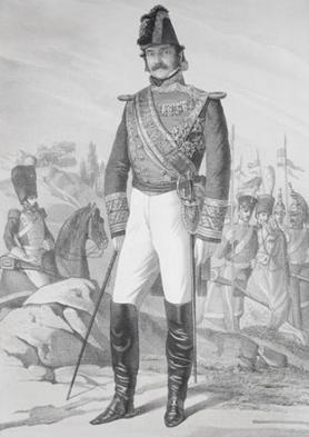 litografía del teniente general Valentín Ferraz y Barrau.